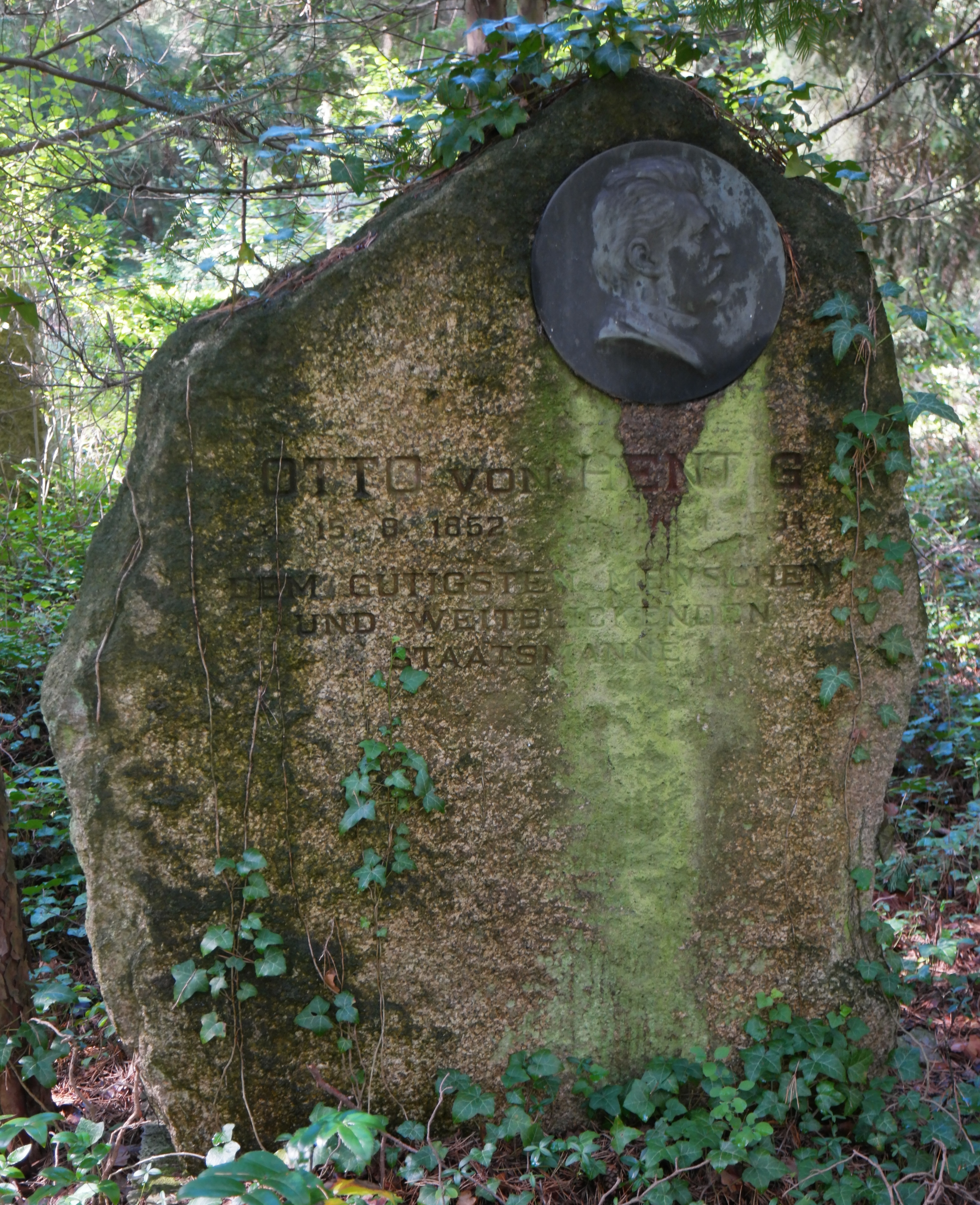 Grab des Juristen und Politikers Otto von Hentig (1852-1934) auf dem Wilmersdorfer Waldfriedhof in Stahnsdorf